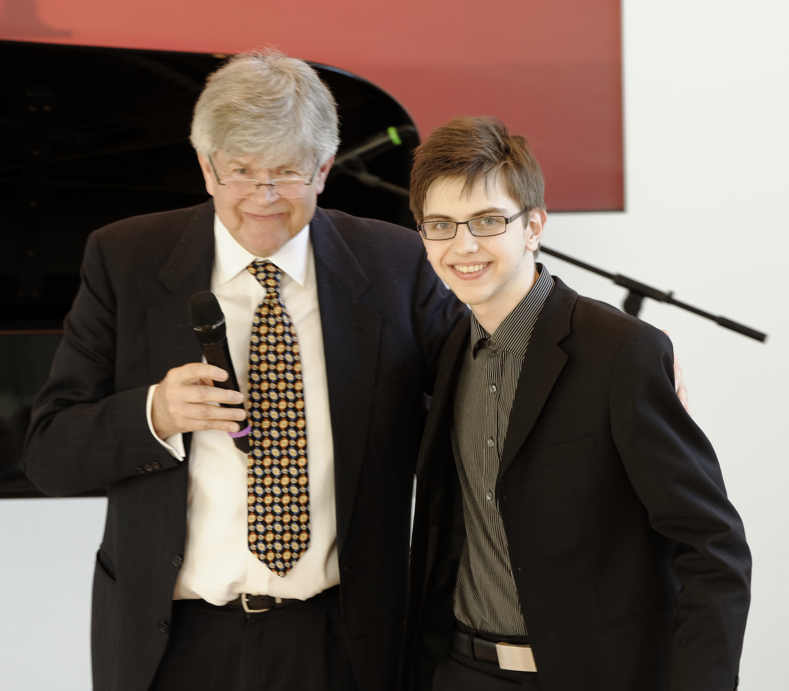 Rotary Klavierwettbewerb 2013